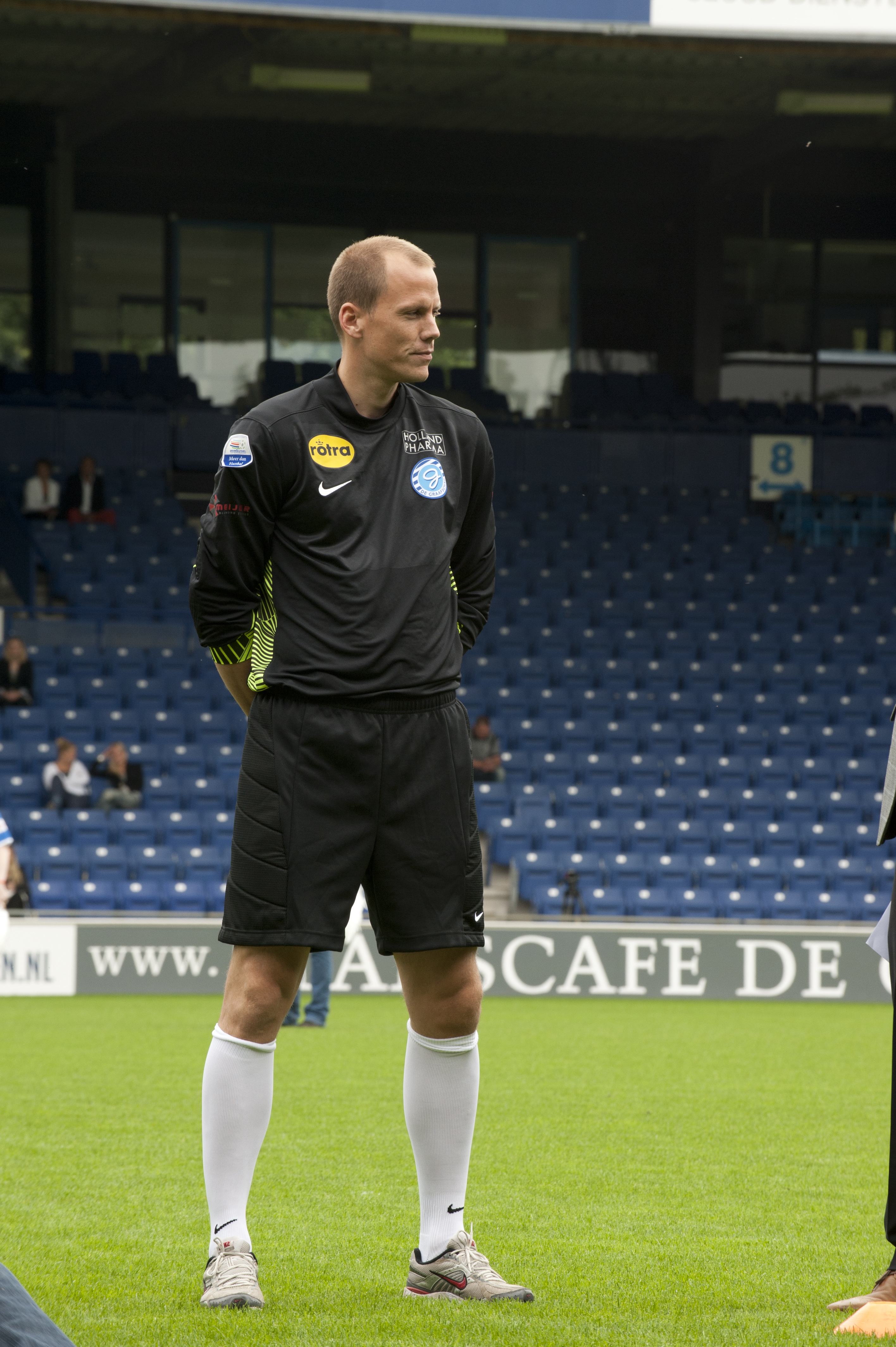 Joost Terol namens De Graafschap op de open dag in 2011.